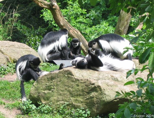 in Noorder Dierenpark Emmen, vrijgegeven onder GNU-FDL